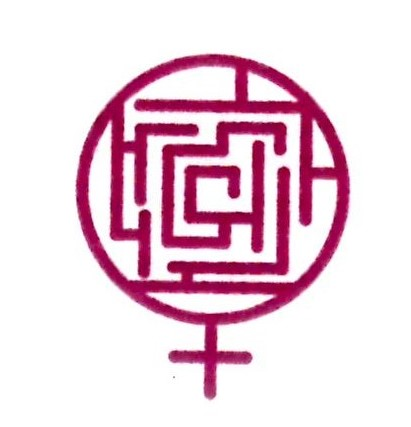 Logo della Casa della Donna di Pisa -Simbolo Femminile-Labirinto